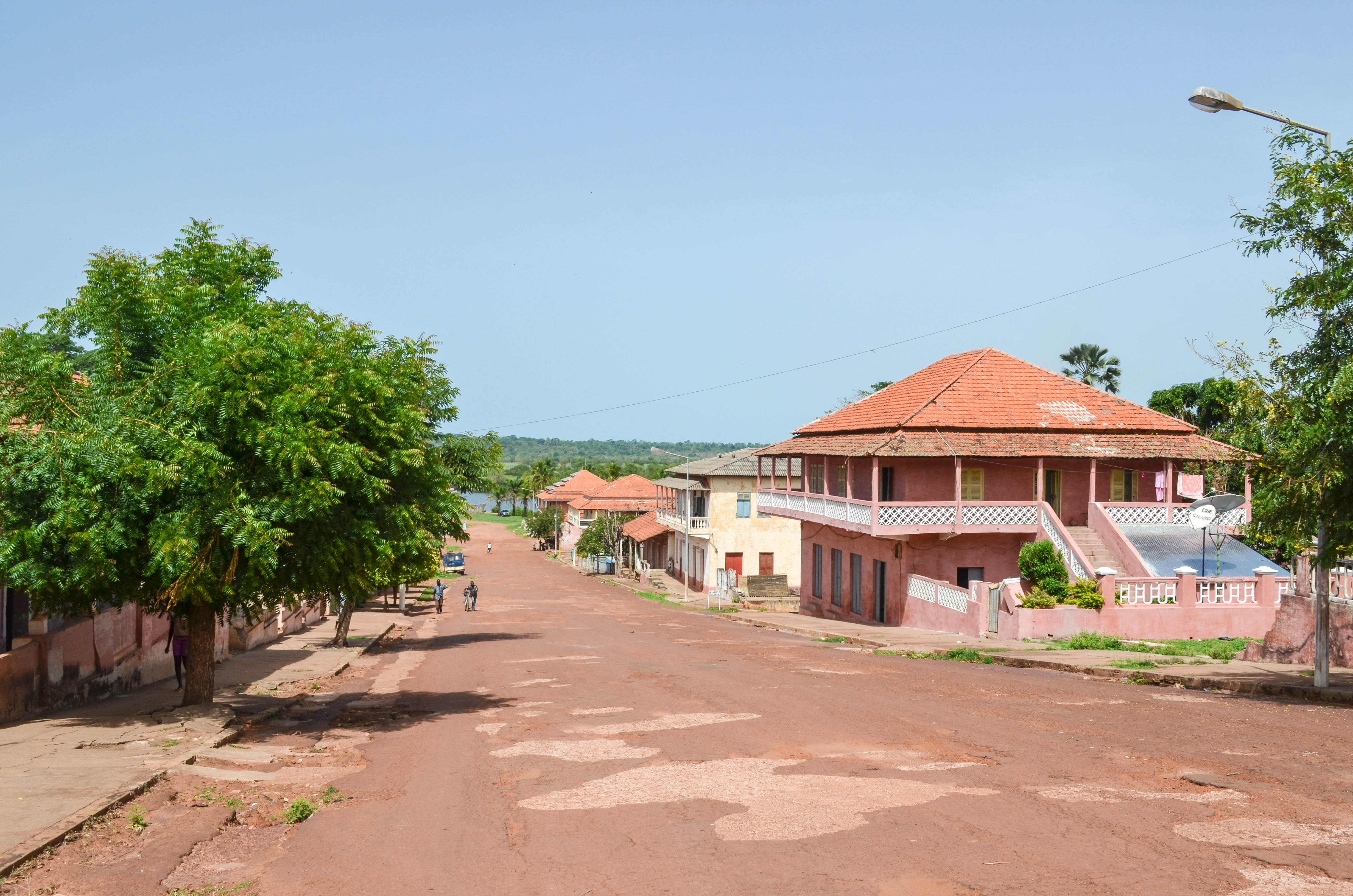 20130612-DSC_9045